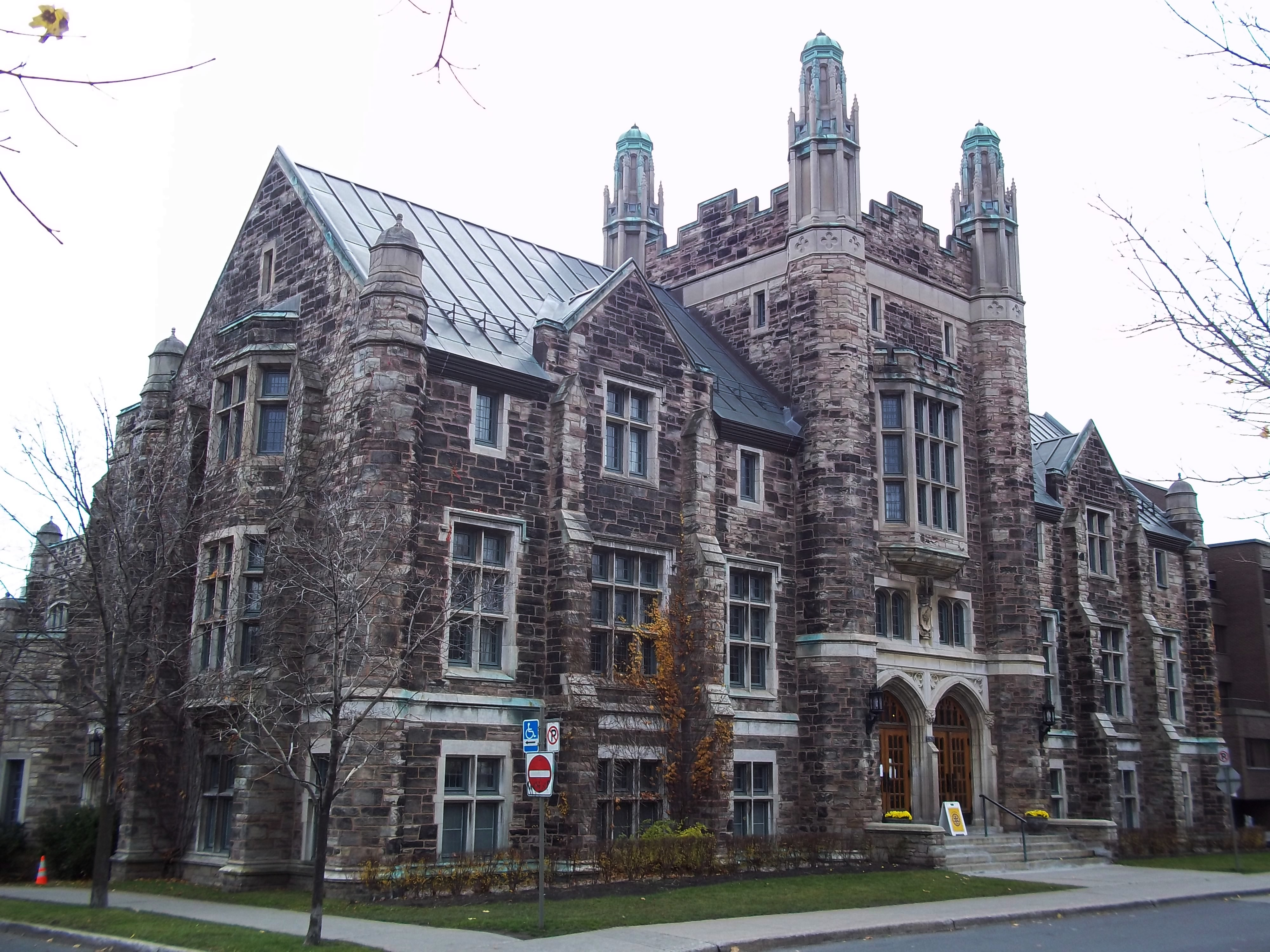 Centre communautaire Victoria Hall, 4626, rue Sherbrooke Ouest, Westmount, Montréal